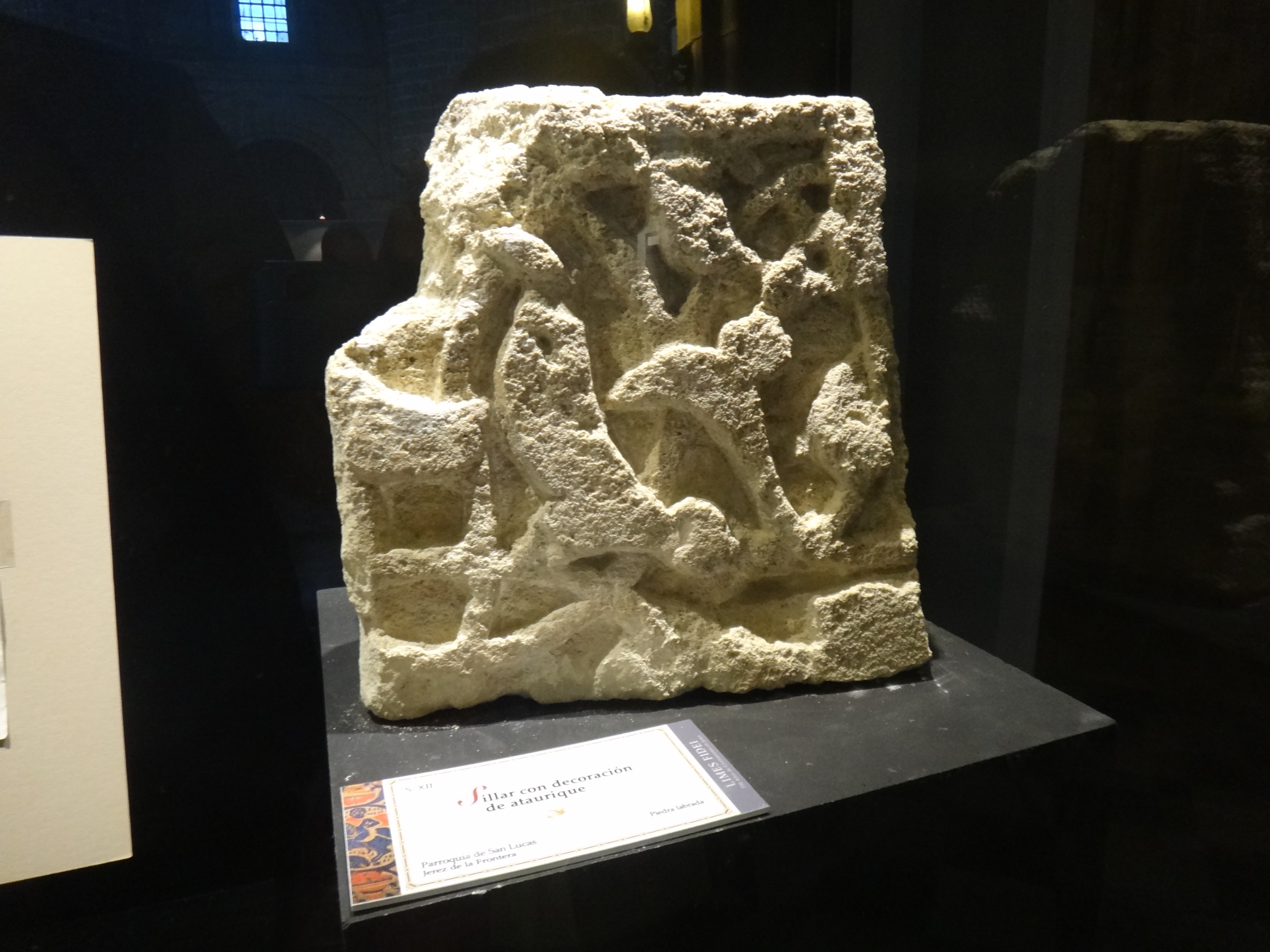 Exposición 'Limes Fidei. 750 años de cristianismo en Jerez' en la Catedral de Jerez de la Frontera